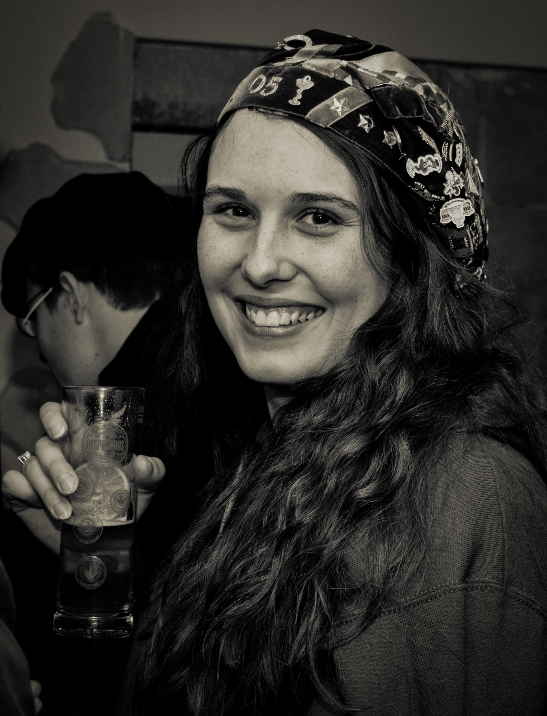 Une falucharde